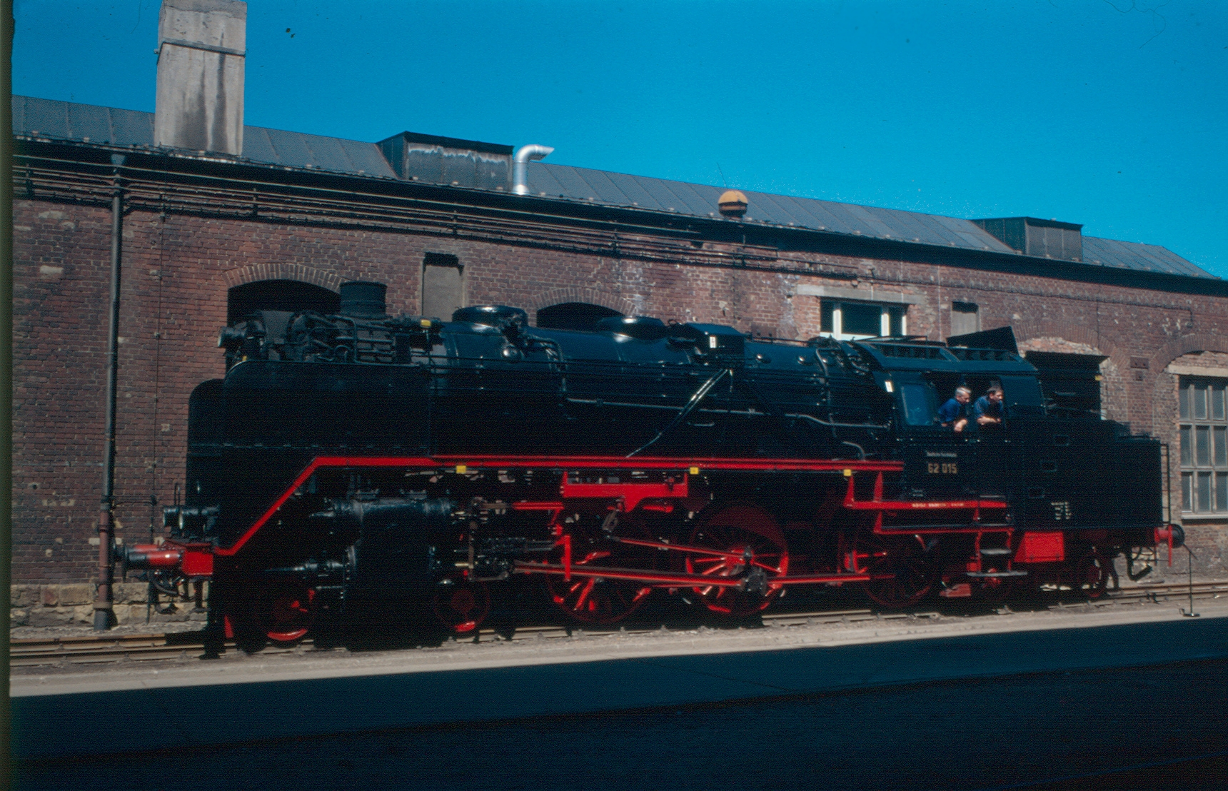 Dampflokomotive BR 62 015 der Deutschen Reichsbahn.